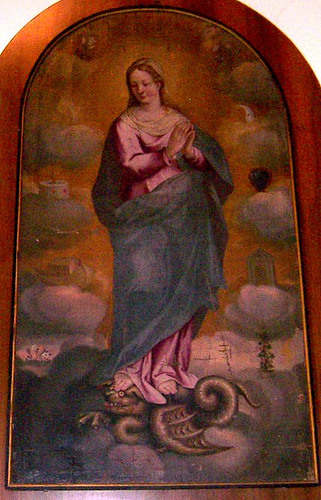 Madonna Addolorata Cles Convento S.Antonio